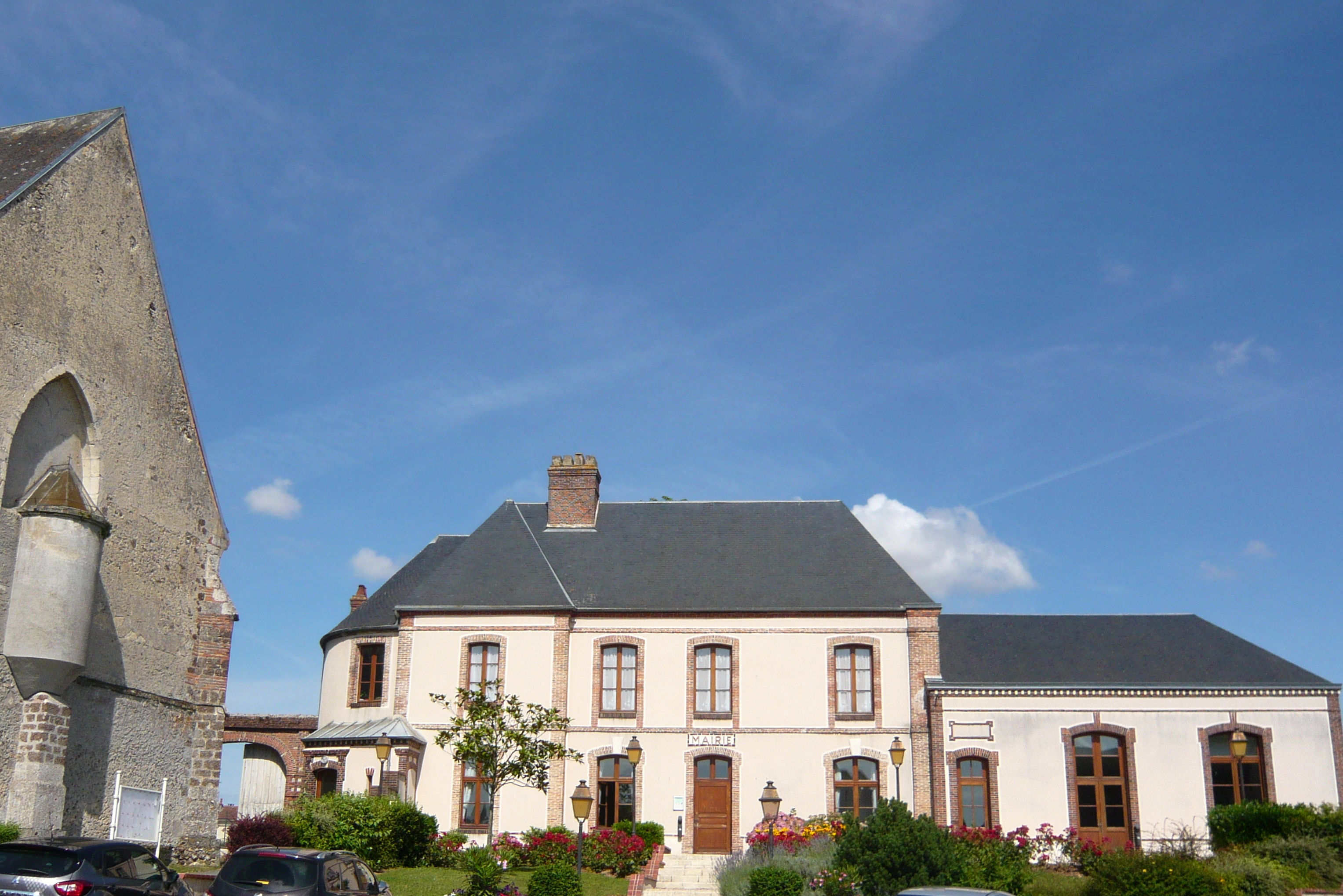 Mairie et église Saint-Germain, Digny, Eure-et-Loir (France).